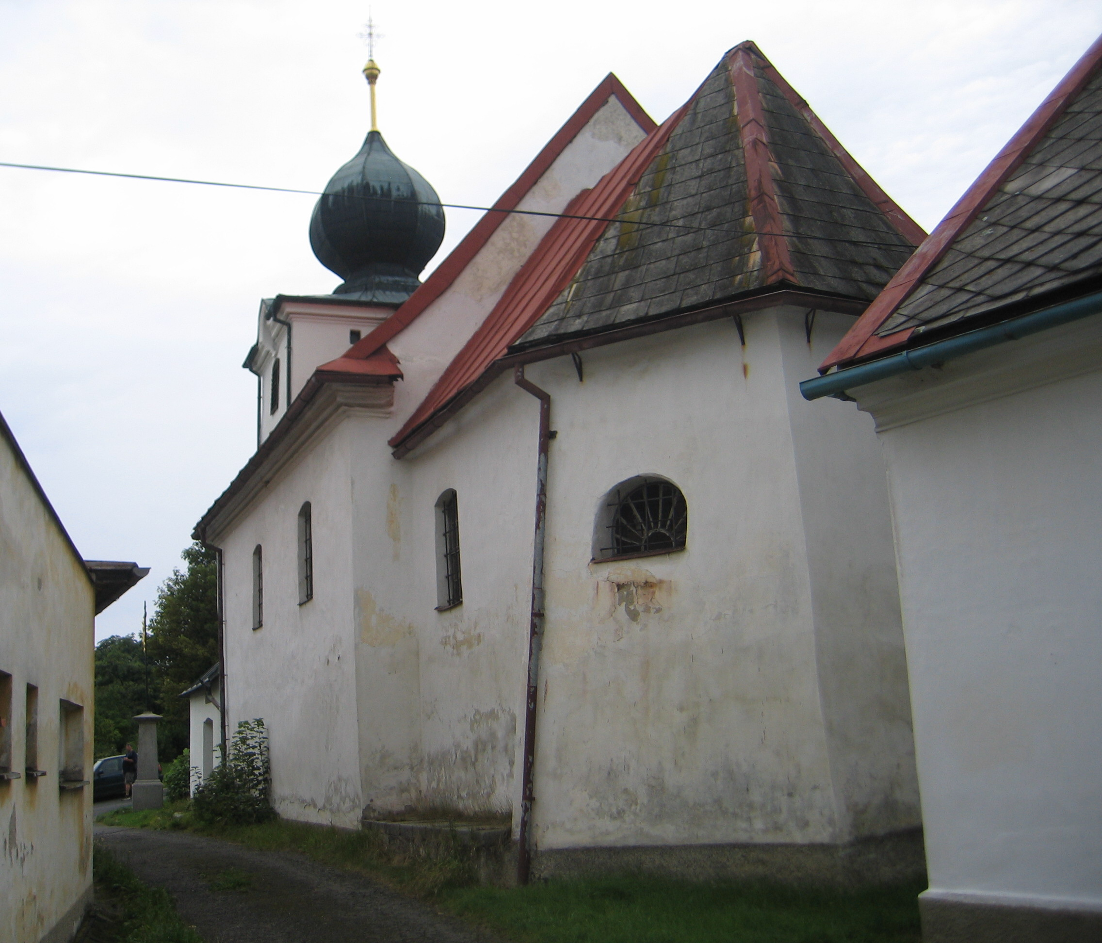 Hory Matky Boží (okr. Klatovy), kostel Jména Panny Marie od východu.